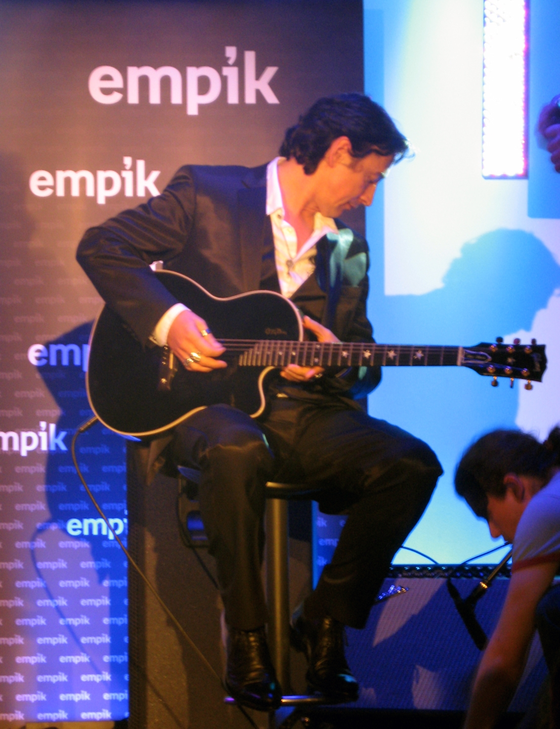 Koncert-wspomnienie z okazji imienin śp. Jacka Skubikowskiego w Salonie Empik Junior w Warszawie (17 marca 2008). Na zdjęciu: Jan Borysewicz z zespołu Lady Pank